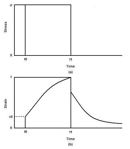 蠕变图片